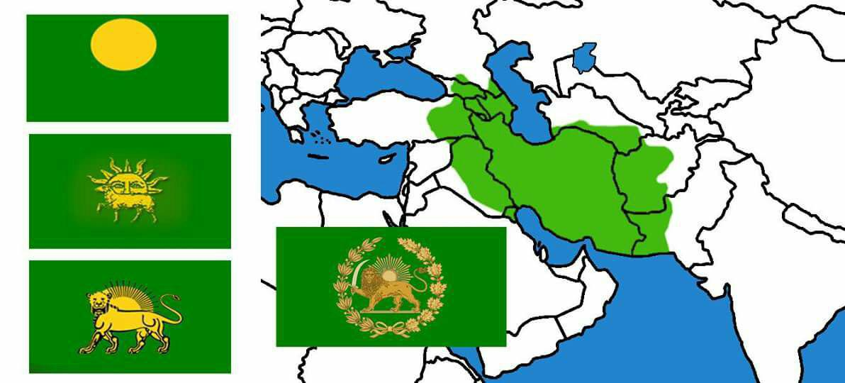 گستره سلطنت صفویان و پرچمهایشان